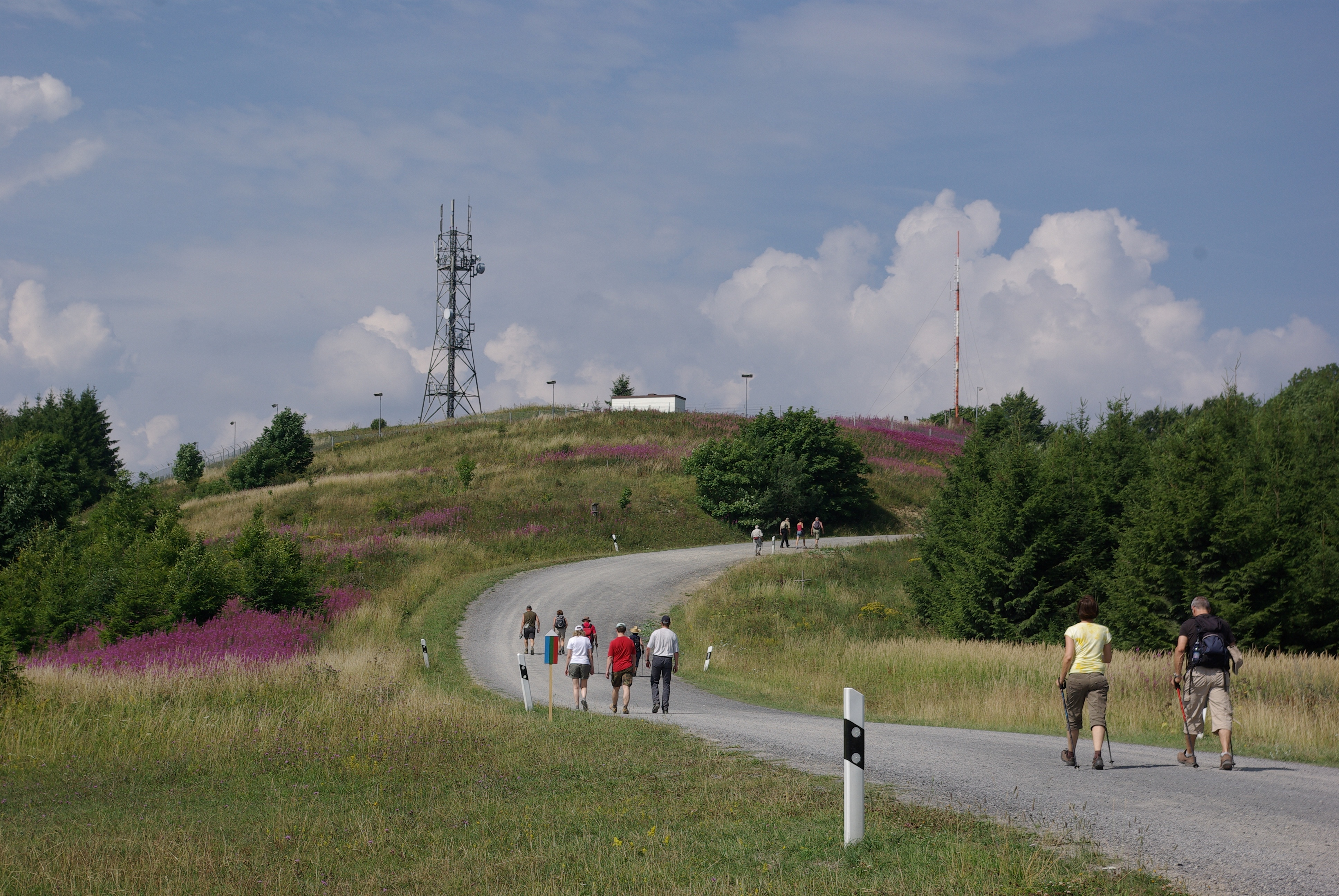 Westliches Plateau der Mittelberges in der Rhön mit Antennenmasten